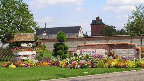 Entrée de ville fleurie.